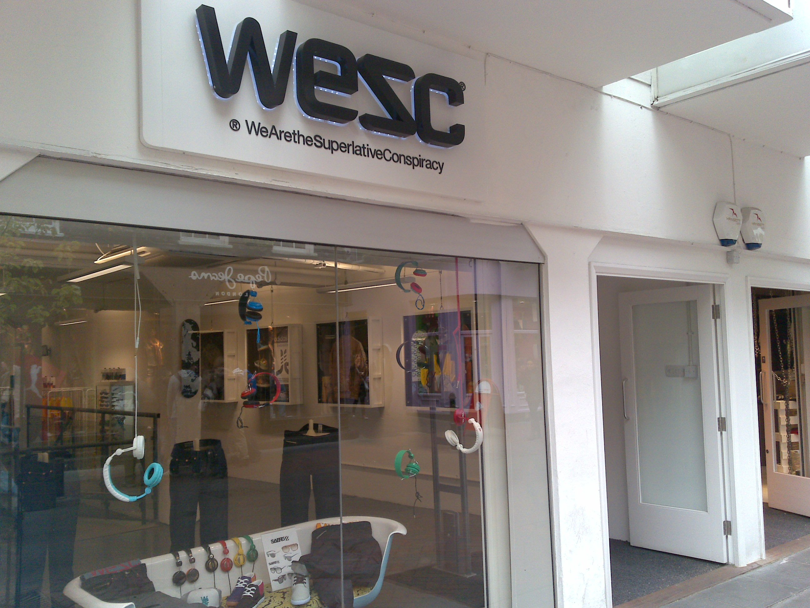 WeSC-affär på carnaby street i London.